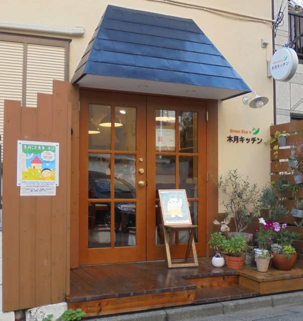 Kiduki Kichen, Kanagawa Prefecture, Japan